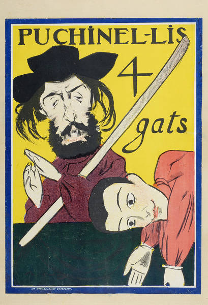 Cartell de Ramon Casas per a un espectacle de putxinel·lis al local dels Quatre Gats, on apareix caricaturitzat en Pere Romeu